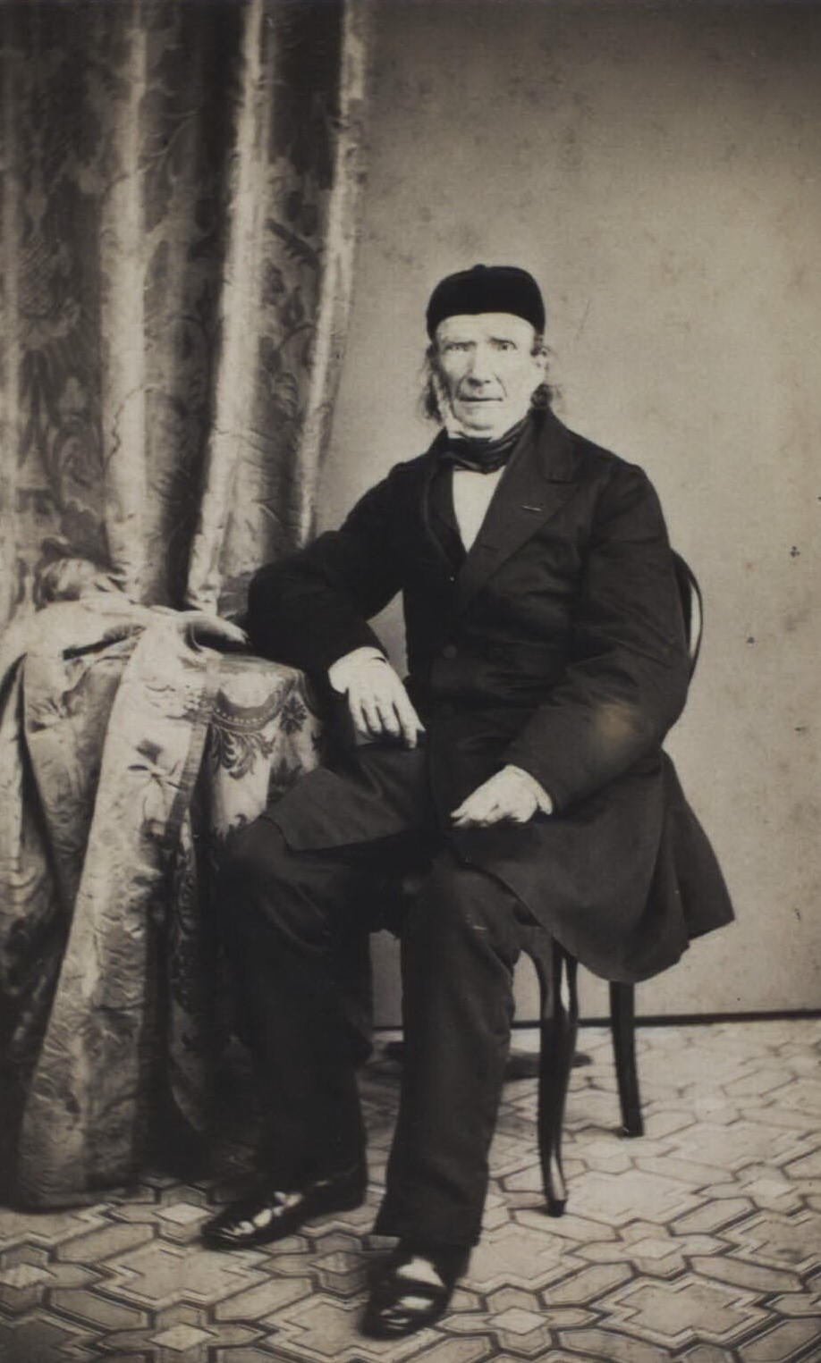 Christen Estrup (20-06-1790 - 17-09-1868) dansk borgmester.